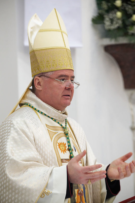 Епископ епархии Кишинёва